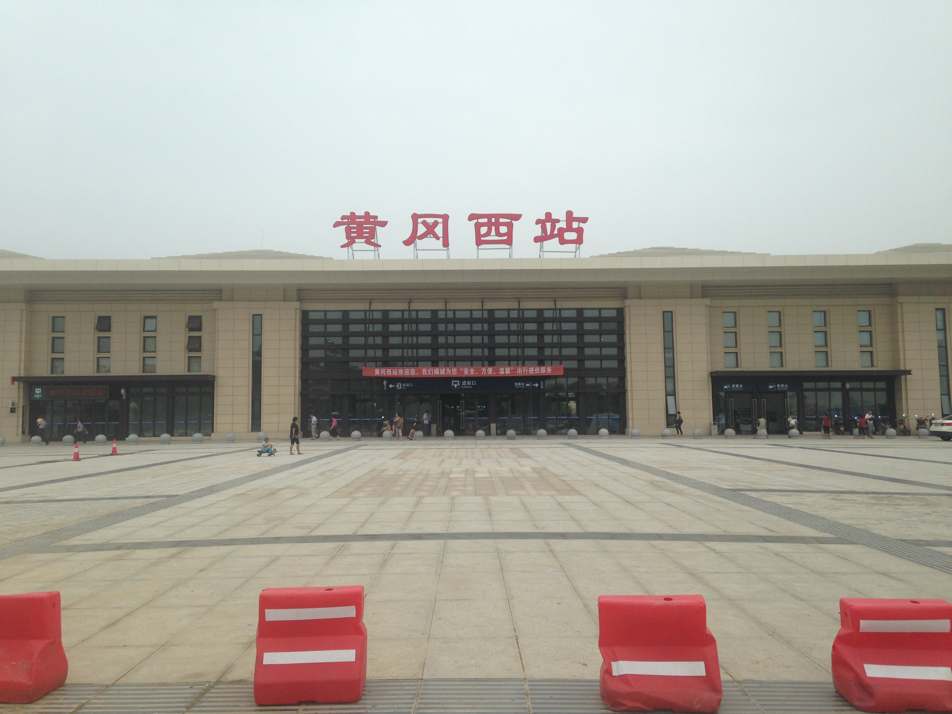 黄岡西駅の駅舎